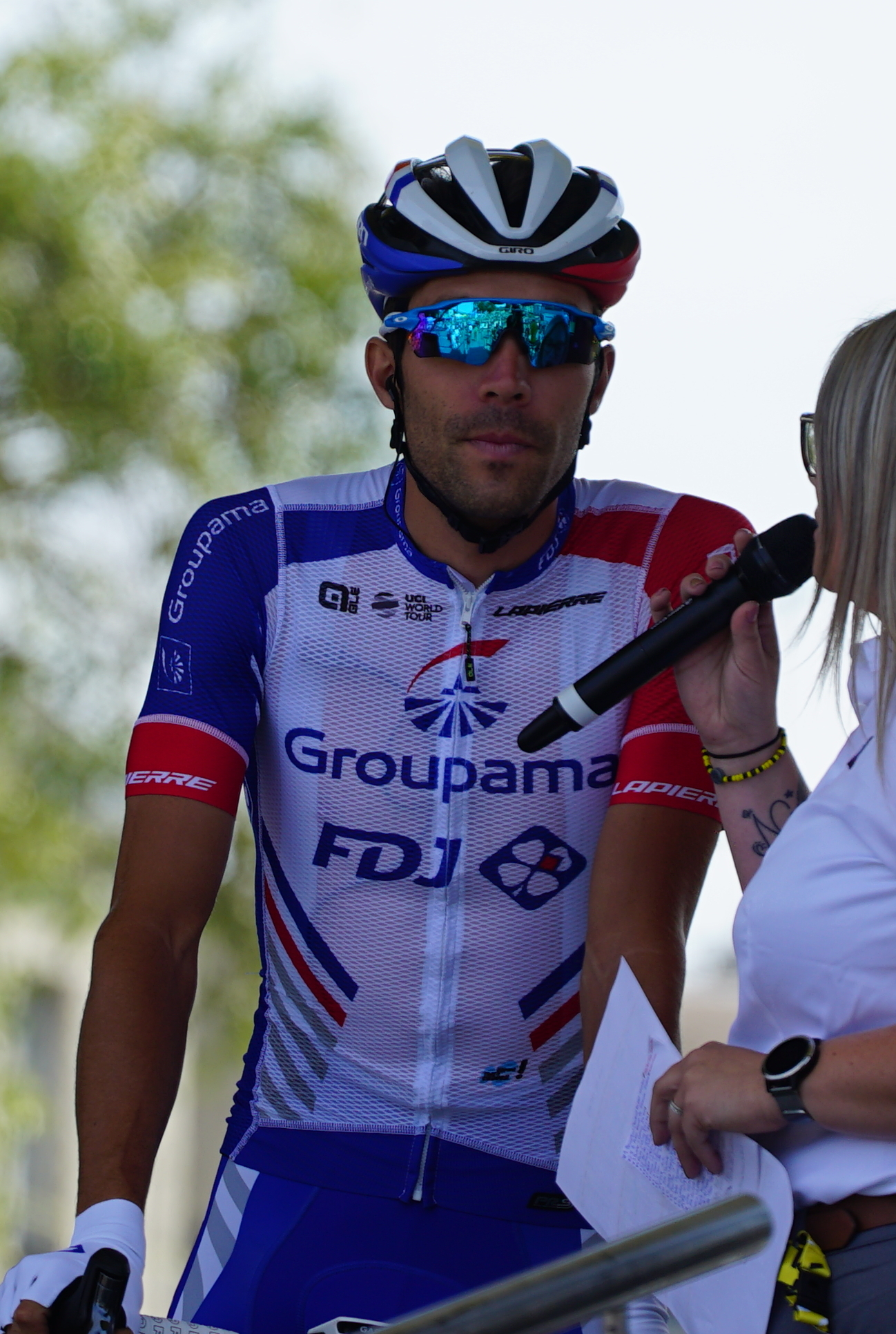 signature pour le départ de Reims.